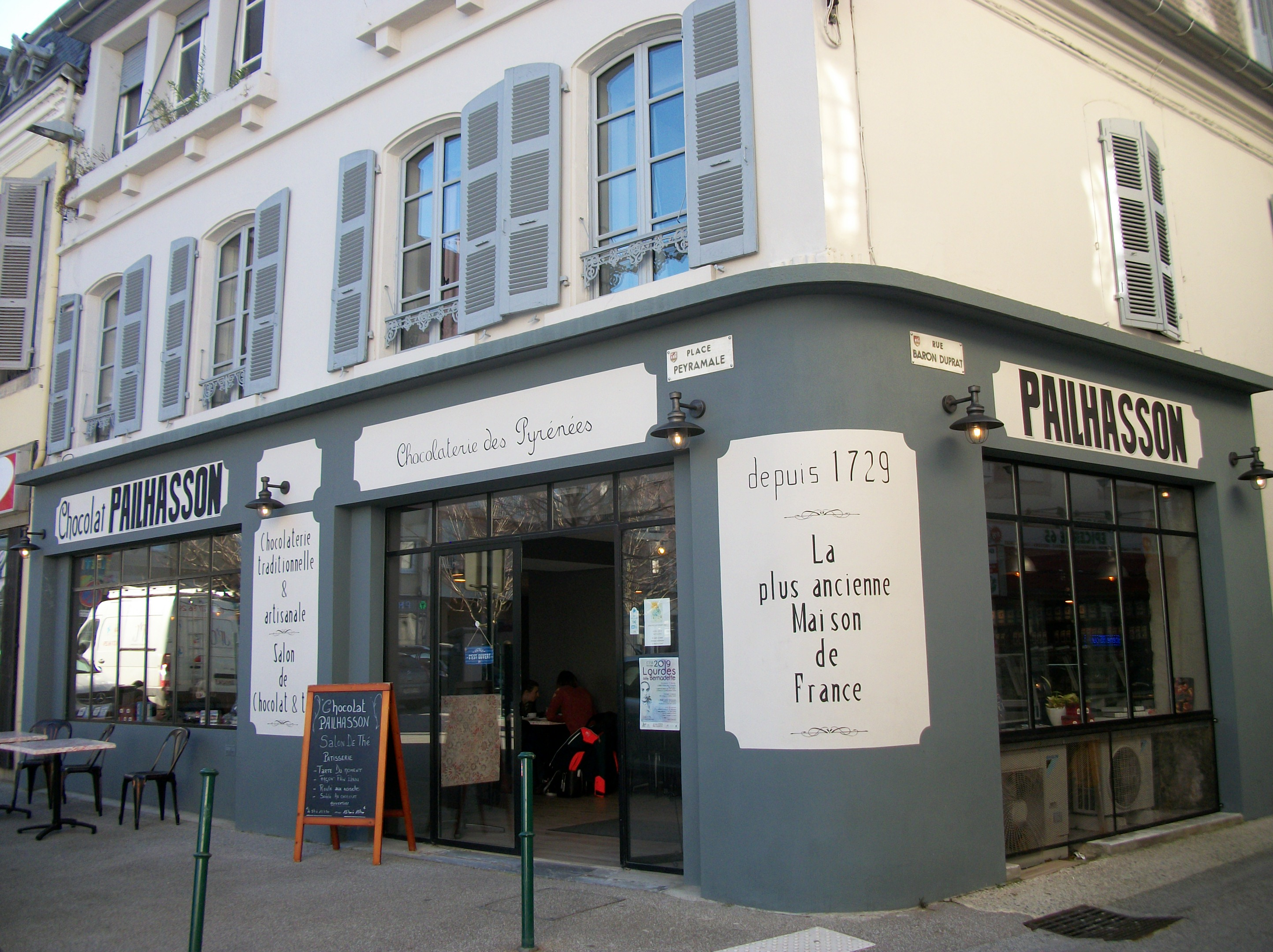 Boutique et salon de thé à Lourdes